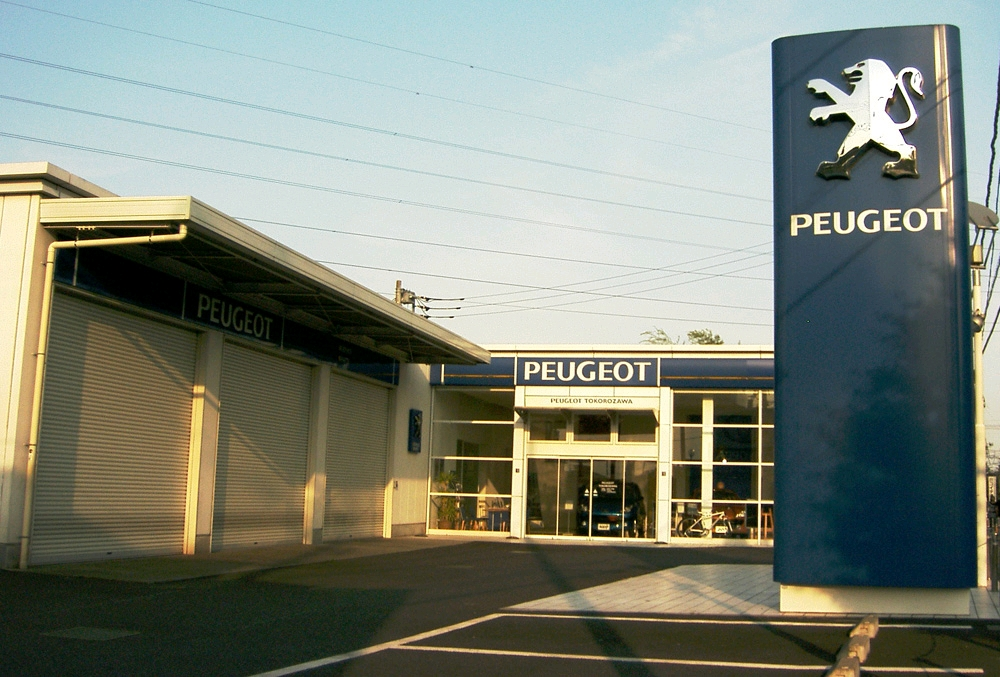 “Peugeot_Car_dealership_Tokorozawa_Saitama”